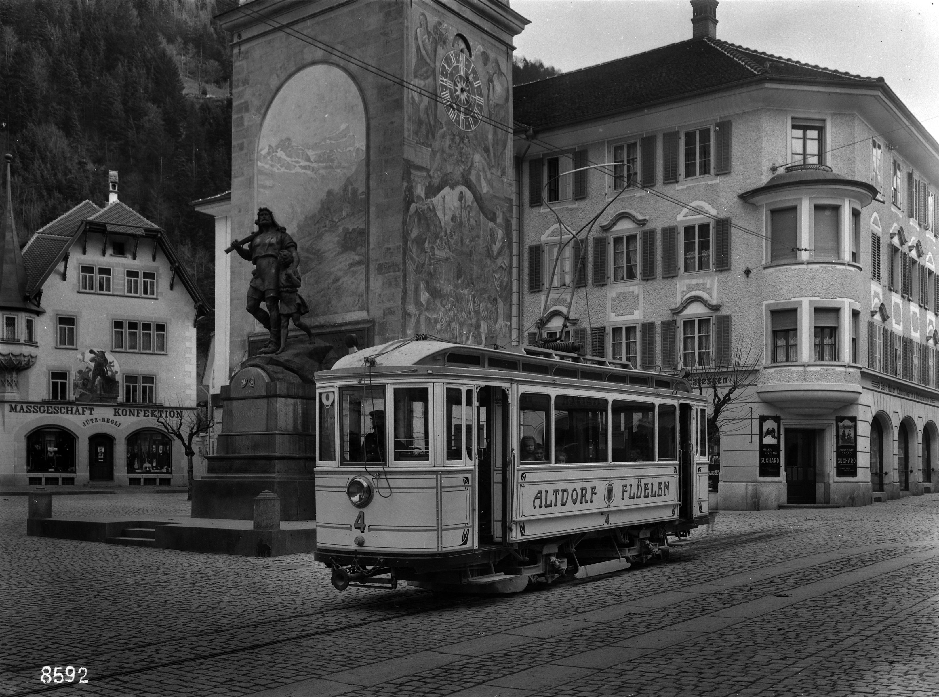 Triebwagen Ce 2/2 Nr. 4 der Strassenbahn Flüelen-Altdorf